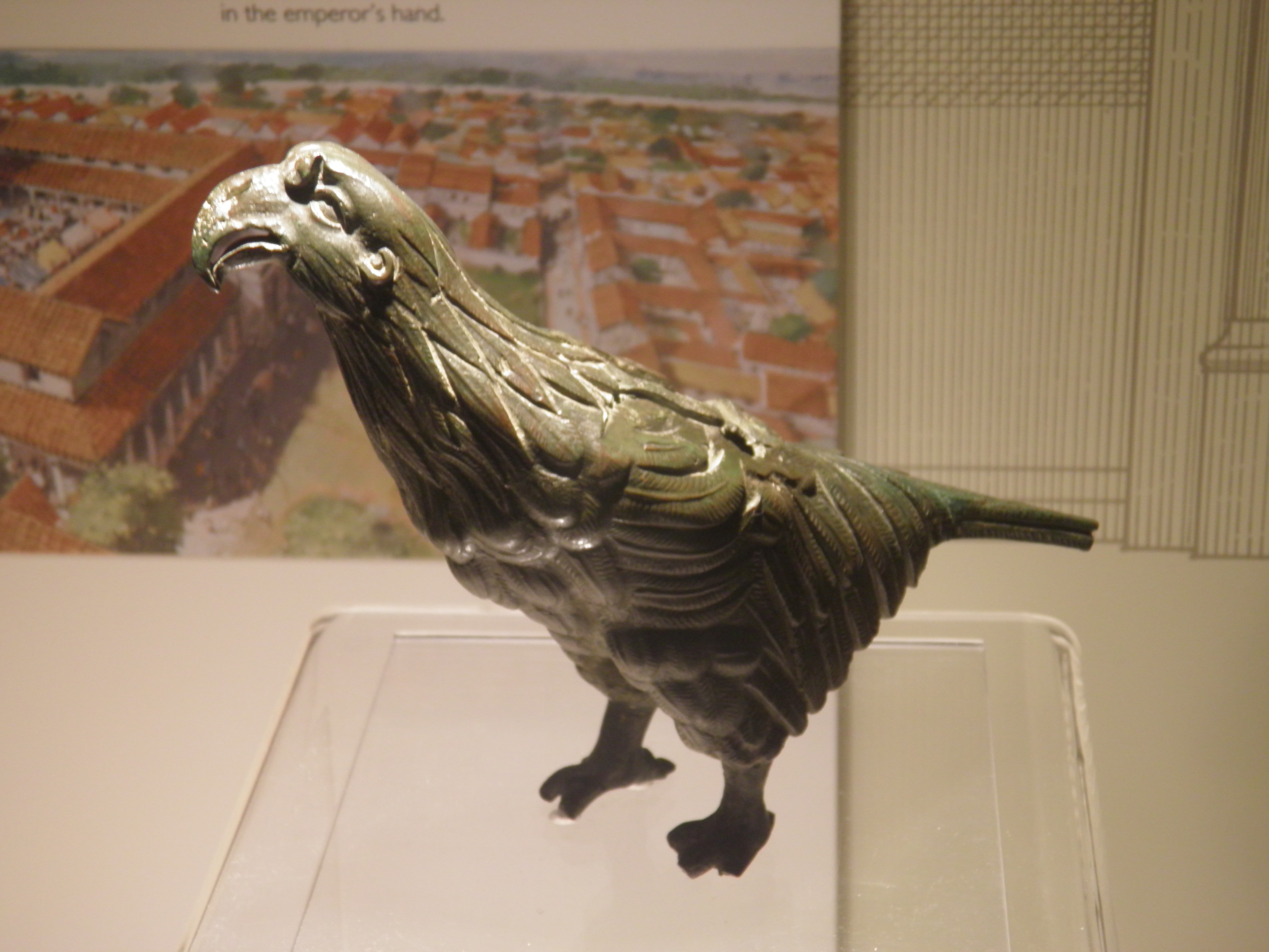 Reading Museum